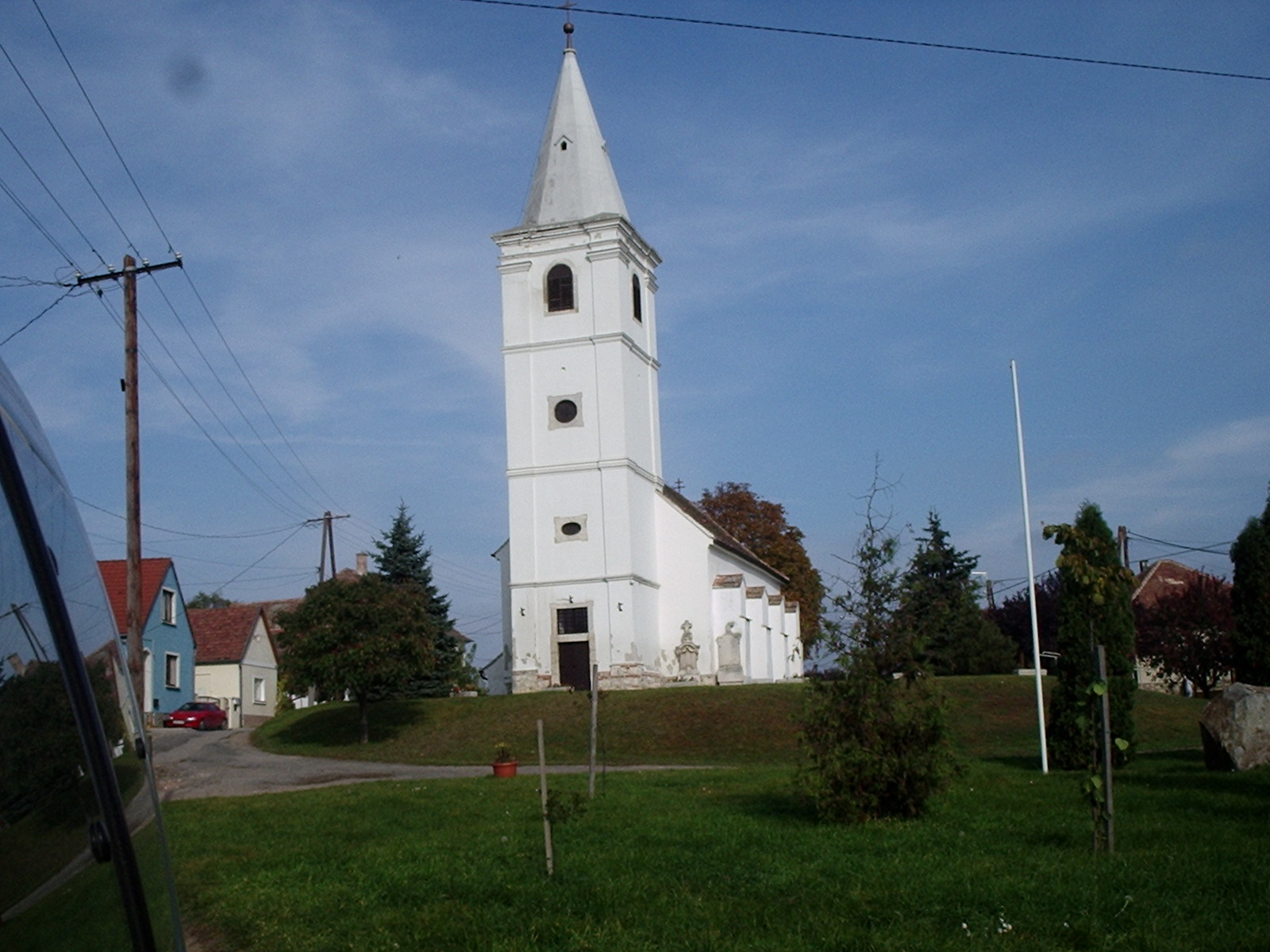 Harka, Árpád-kori Szent Péter és Szent Pál római katolikus templom